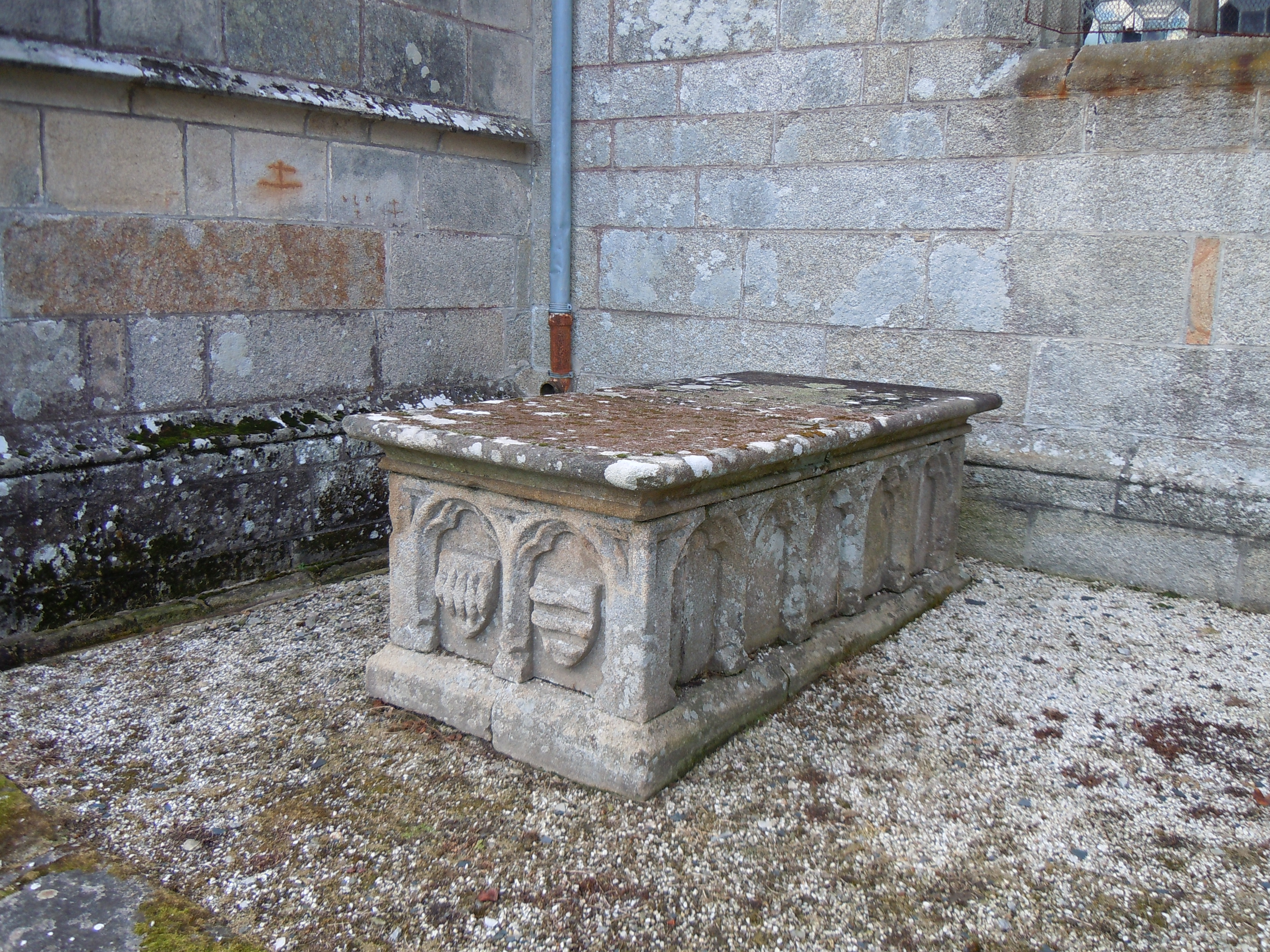 tombeau portant les armoiries des familles De Bouteville et De Trogoff (Le Faouët dans le département du Morbihan)